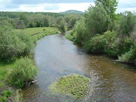 Ural in der Nähe von Belorezk (Russland,Baschkortestan)